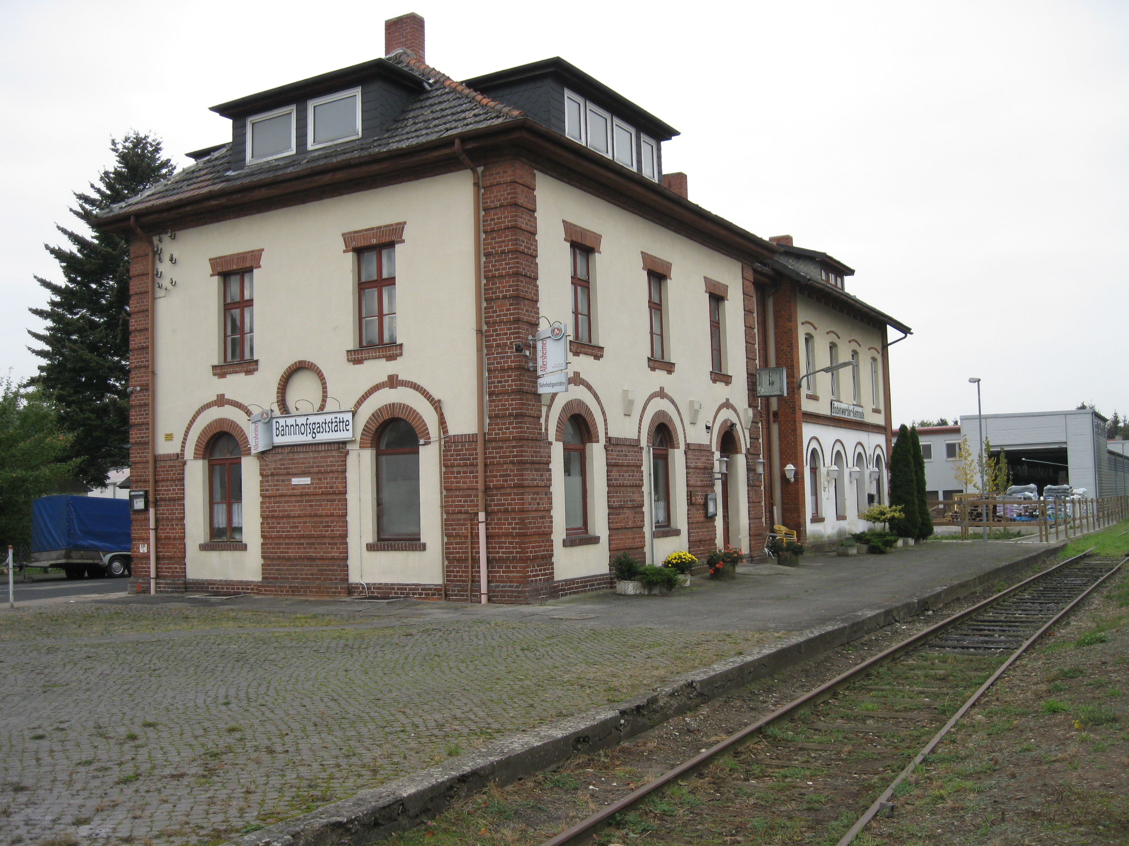 Den nedlagte Bodenwerder Kemnade banegård, Tyskland